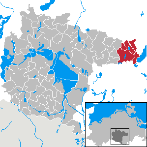 Amt Penzlin in Mecklenburg-Western Pomerania - District Müritz